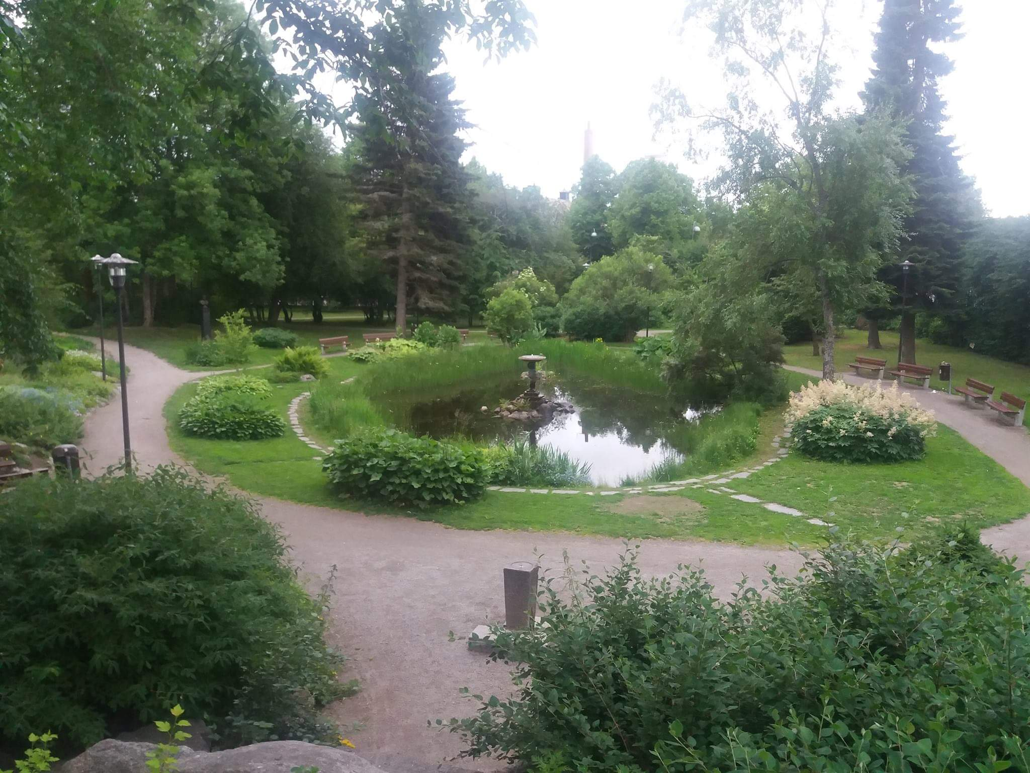 Koulupuiston lammikko Pietarsaaressa.